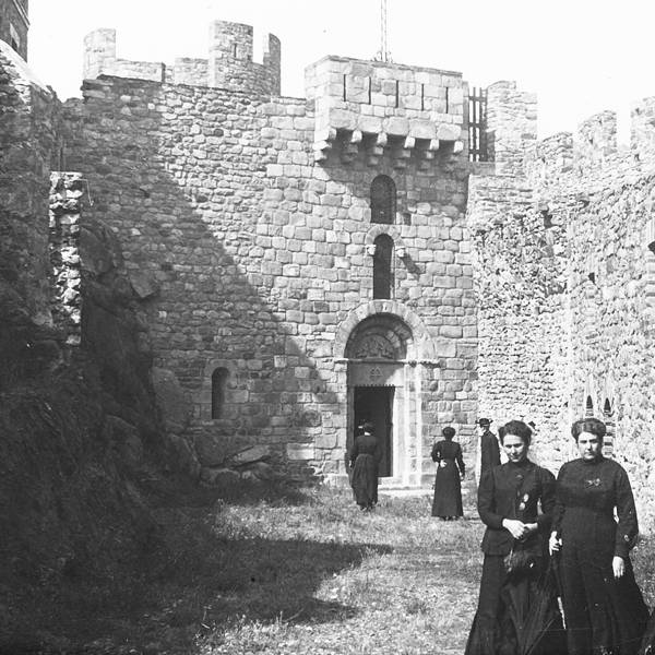 Pati del primer recinte del castell de Requesens, amb la capella al fons, en una fotografia de 1912.